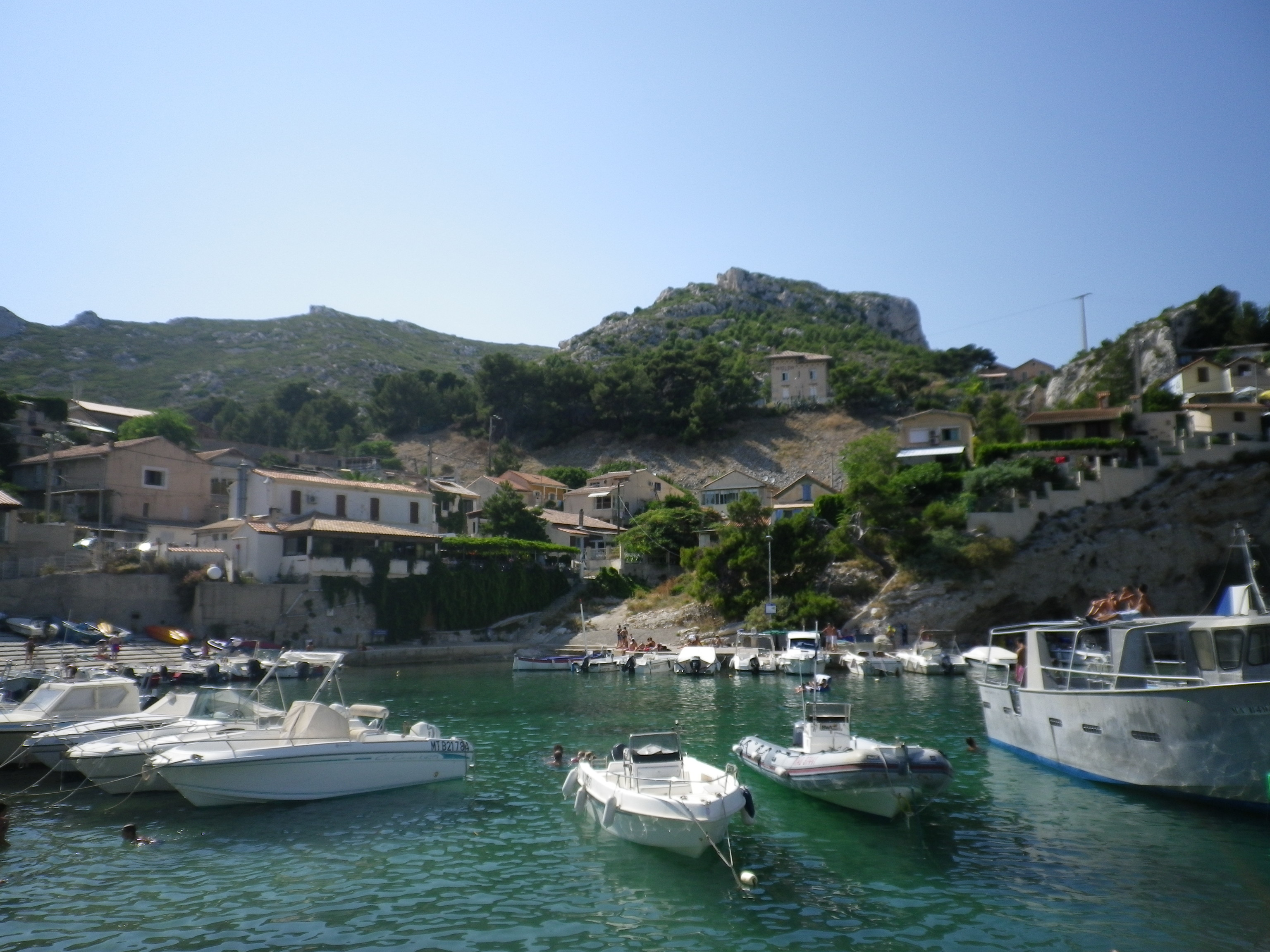 Lo Pòrt de Niolon